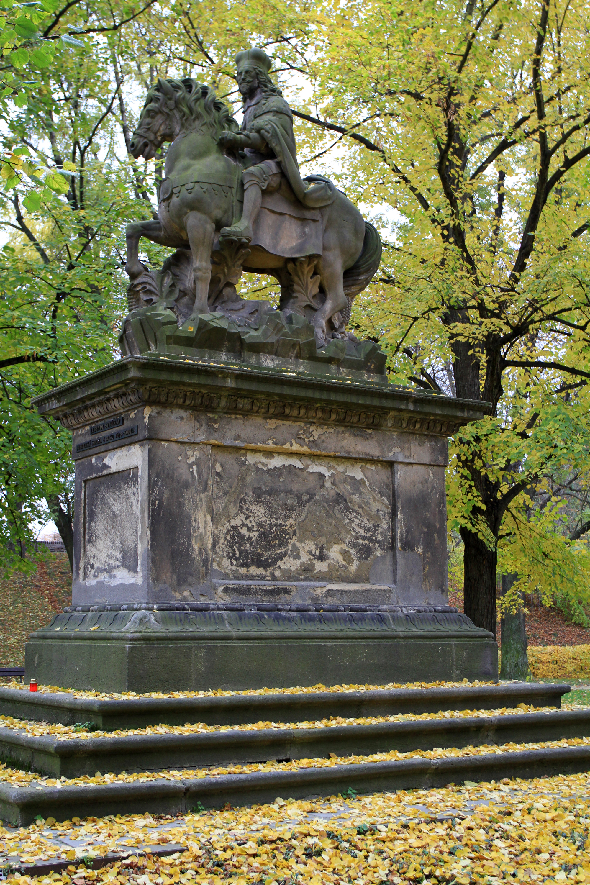 Pevnost Vyšehrad, Praha 2-Vyšehrad, Soběslavova 14/1, V pevnosti 16/2, 35/11, K rotundě 16/3, 81/6, 82/8, 90/12, 91/14, 92/16, 100/10, Štulcova 89/1, 102/2, 69/3